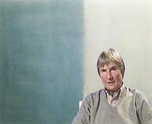 Portrait de Geneviève Asse